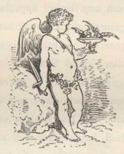 Gustave Doré, ilustração para "Dom Quixote" de Miguel de Cervantes